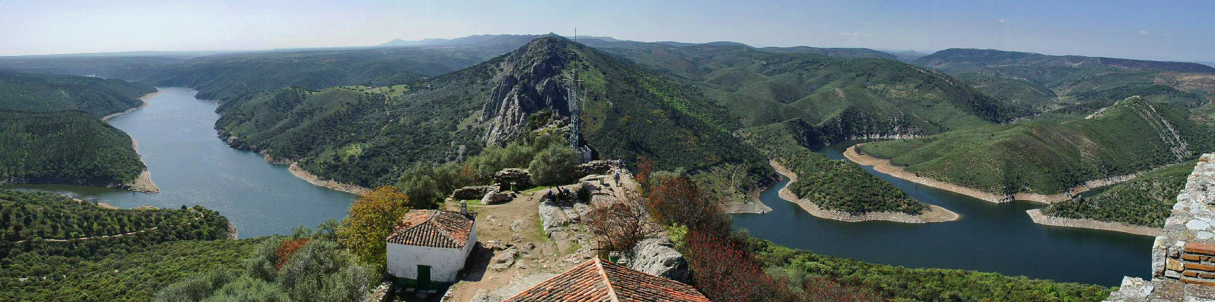 Panorámica desde el castillo de Monfragüe